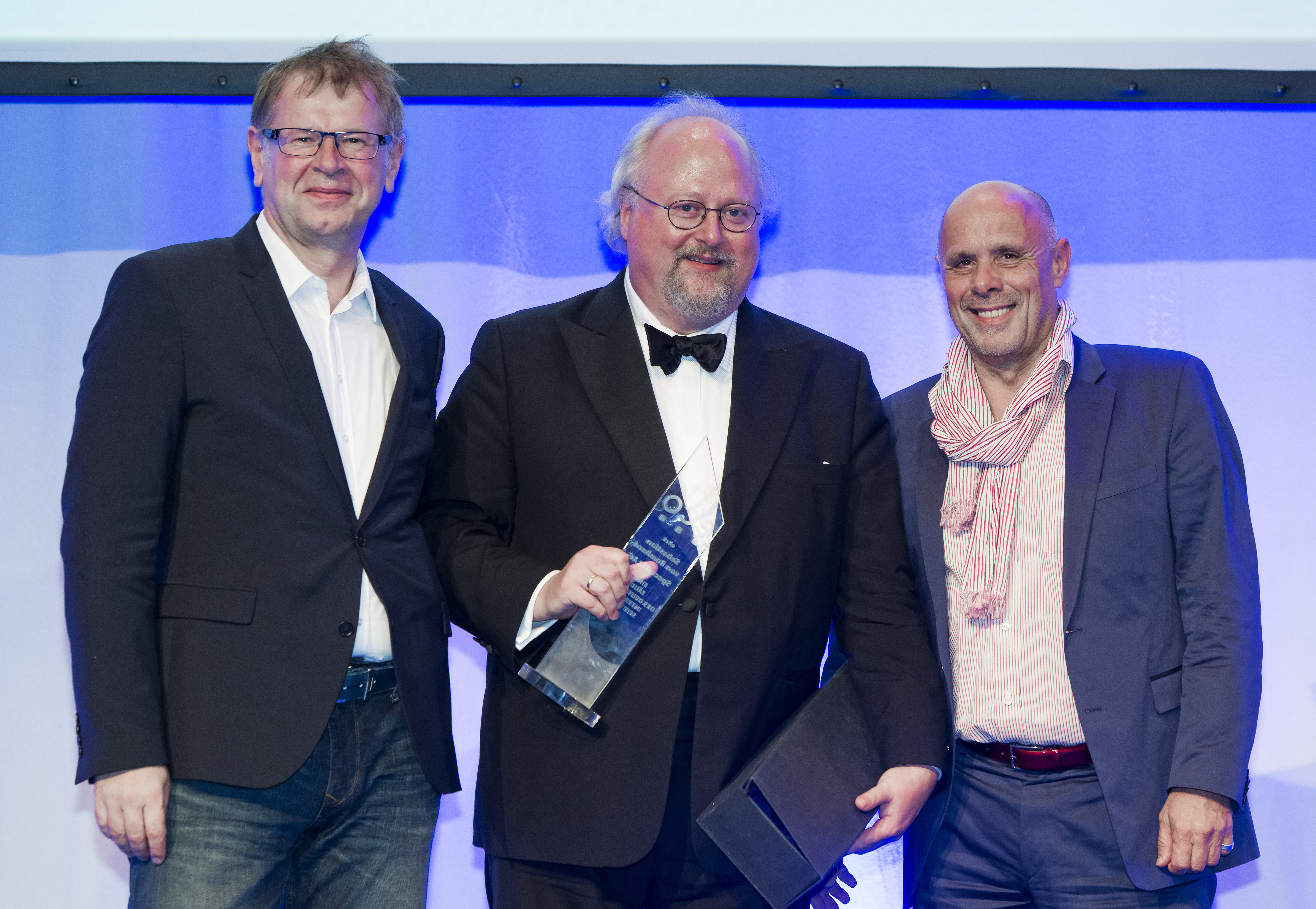 SpaceNet Award Gala 2014: (vlnr) Arnold Nipper - Geschäftsführer nIPper consulting, Sebastian von Bomhard, Harald A. Summa - Geschäftsführer eco e.V / 13.05.2014 / Foto: SpaceNet Award / Stephan Görlich